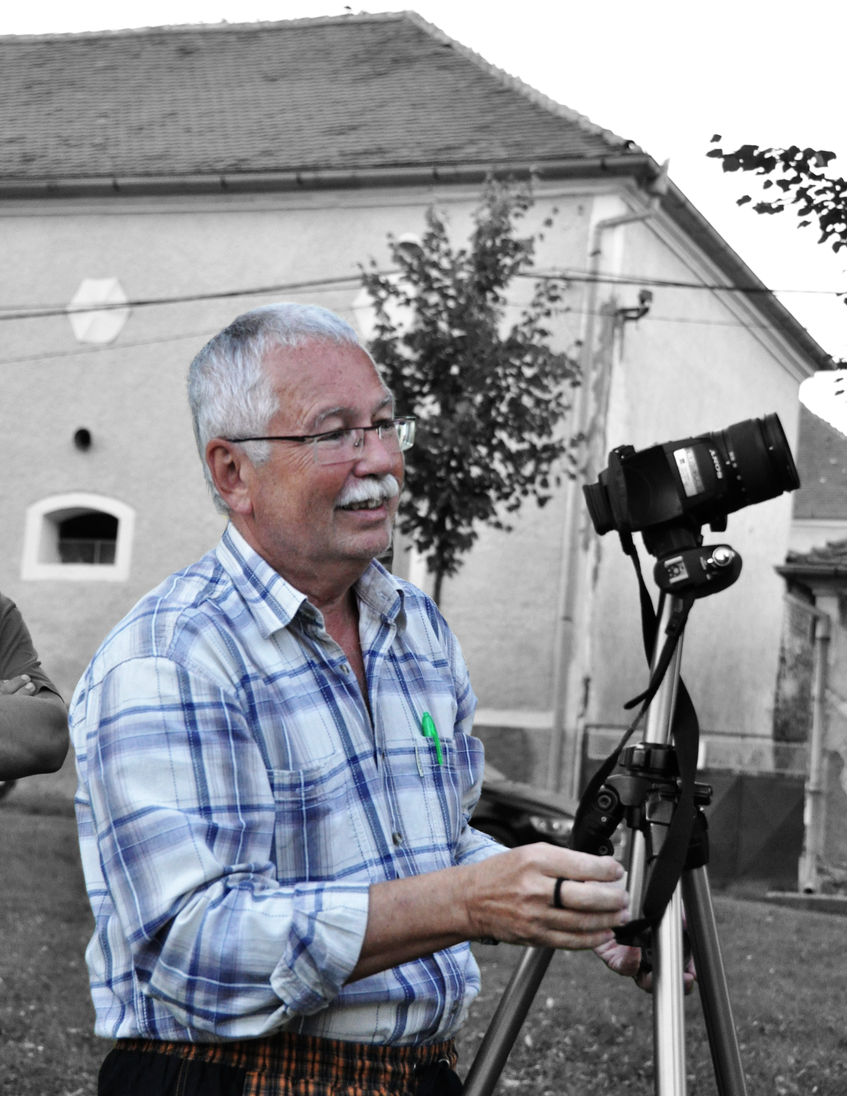 Jiří Škabrada (foto Jan Veselý)